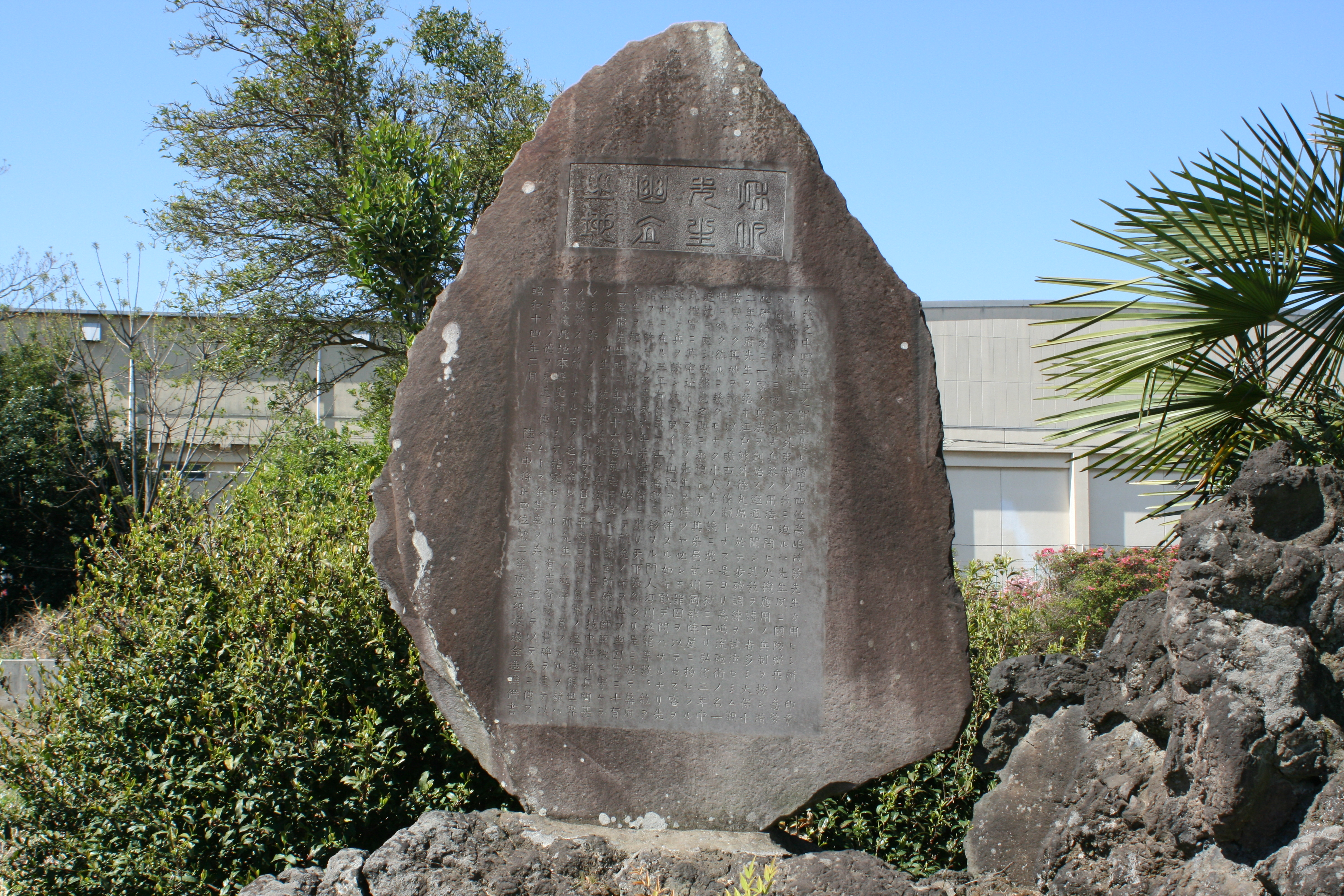 Monument of Okabe Jinya,where Takashima Shūhan was imprisoned